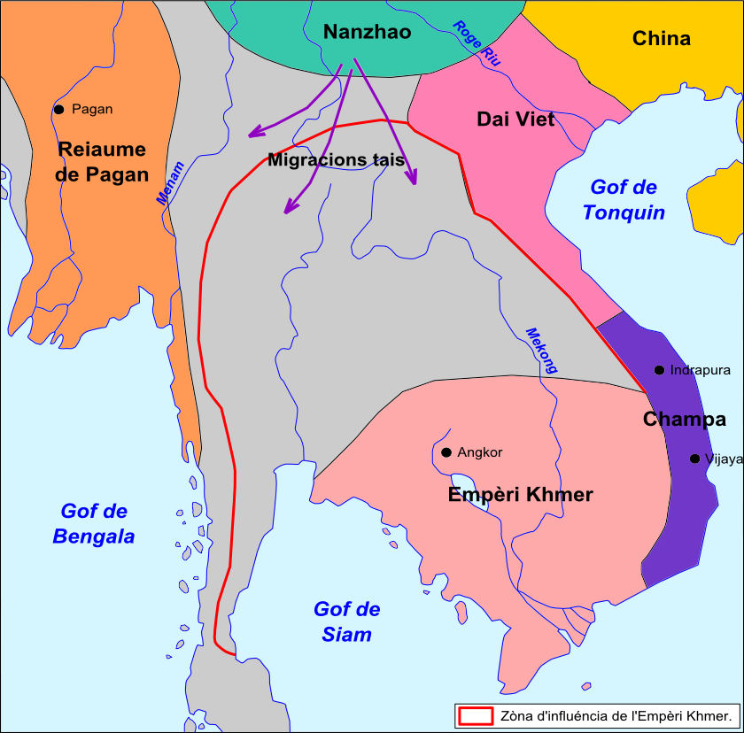 Empèri Khmer dins lo corrent dau sègle XII.